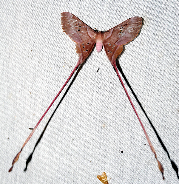 Eudaemonia troglophylla